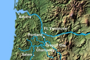 Champoeg, Oregon